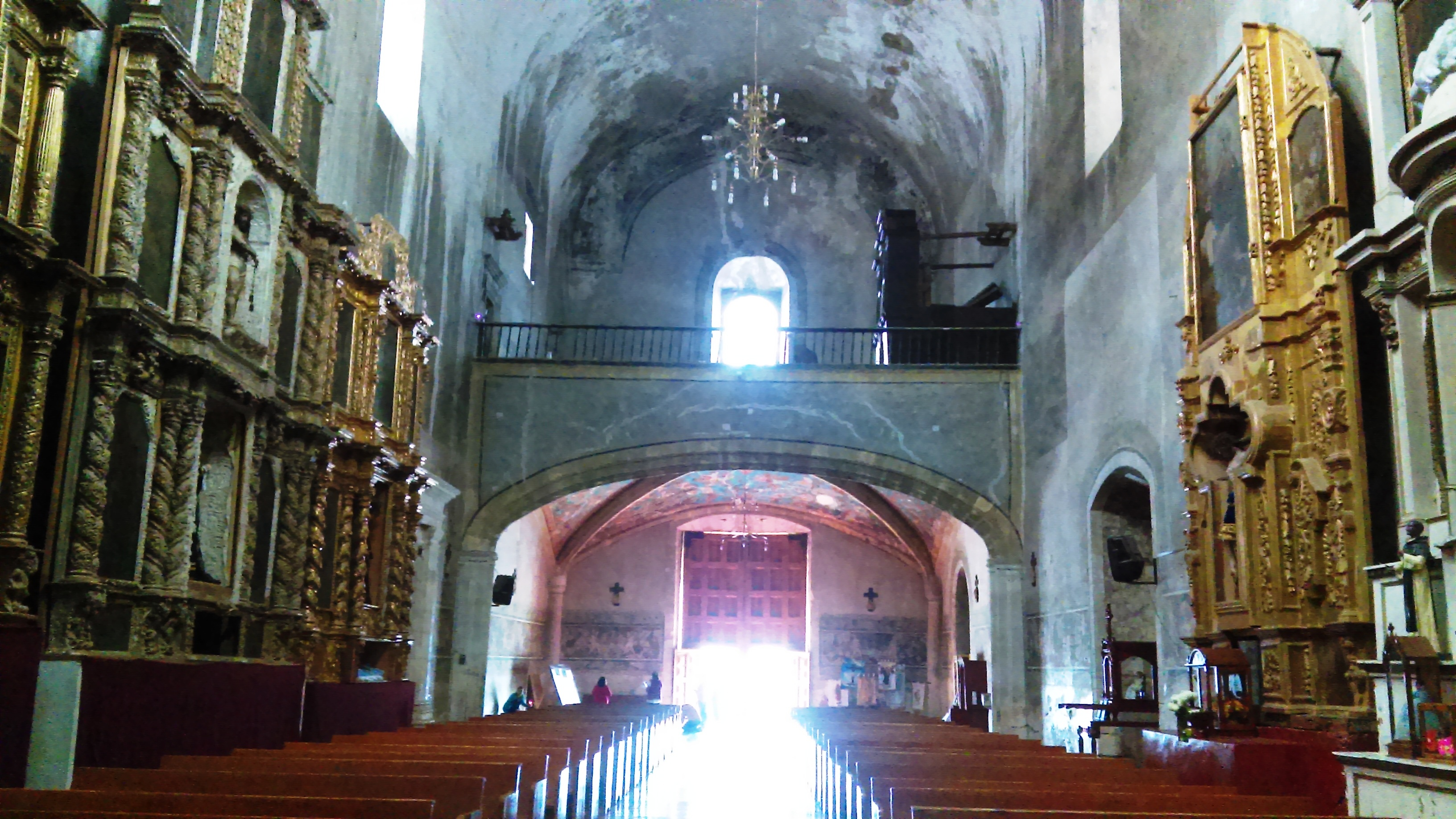 Templo y exconvento de los Santos Reyes, Metztitlán.